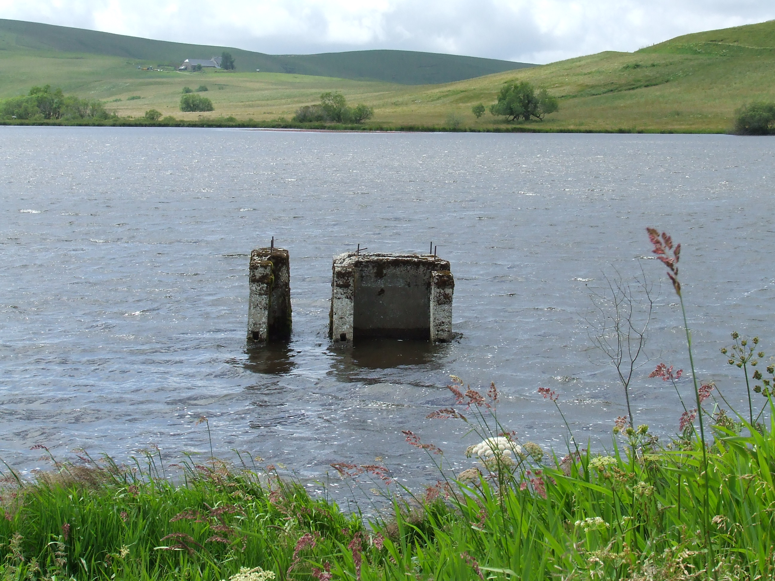 reste des bâtiments d'exploitation industrielle de la diatomite du Lac-d'en-Bas de la Godivelle, département du Puy-de-Dôme, Auvergne.